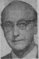 Rudolf Holmgren